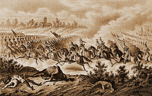 Medole, 24 giugno 1859 - ore 15 c.a. Al termine della Battaglia di Solferino, la Divisione di Cavalleria della Guardia Imperiale guidata dal generale Louis-Michel Morris attraversa il Campo di Medole per portarsi sotto le alture di Cavriana; litografia ridotta e ritoccata.